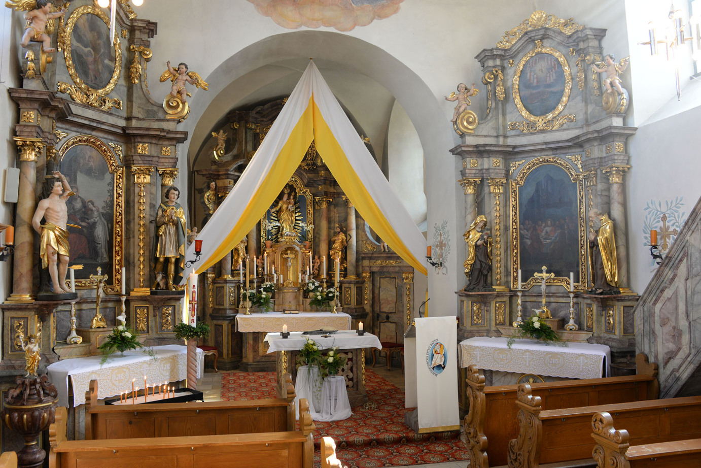 Inneres der Pfarrkirche Pautzfeld